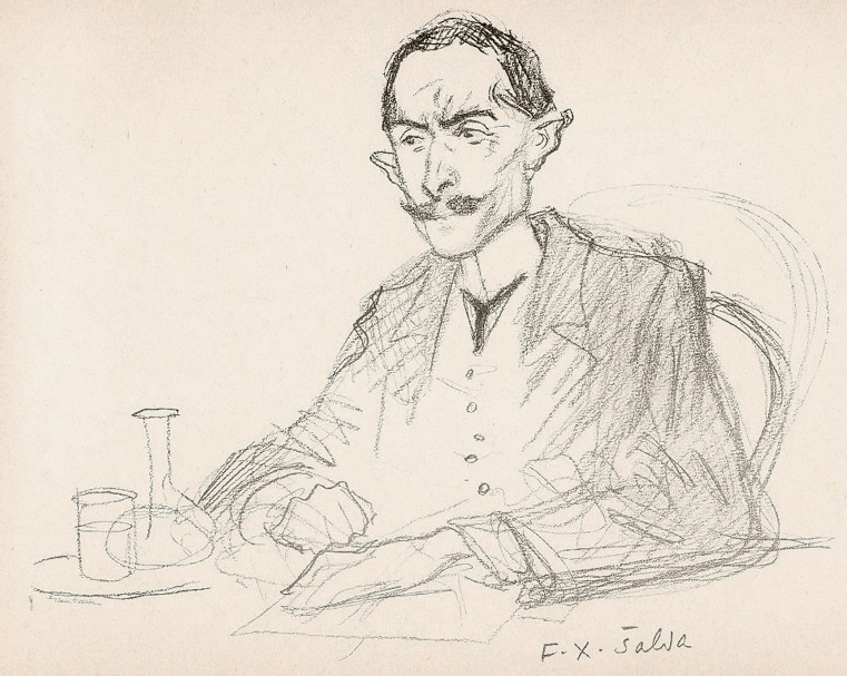 F.X. Šalda- drawing